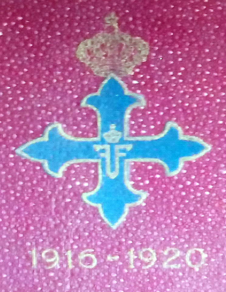 Crucea ordinului Mihai Viteazul reprodusă pe coperta Anuarului ordinului Mihai Viteazu Sursa: lucrarea - Ministerul de Răsboiu, Anuarul ofiţerilor şi drapelelor Armatei Române cărora li s-au conferit ordinul „Mihai Viteazul”, Atelierele grafice „Socec & Co”, Bucureşti, 1922 Restricţii - fără restricţii datorită vechimii. Este un document oficial al statului român